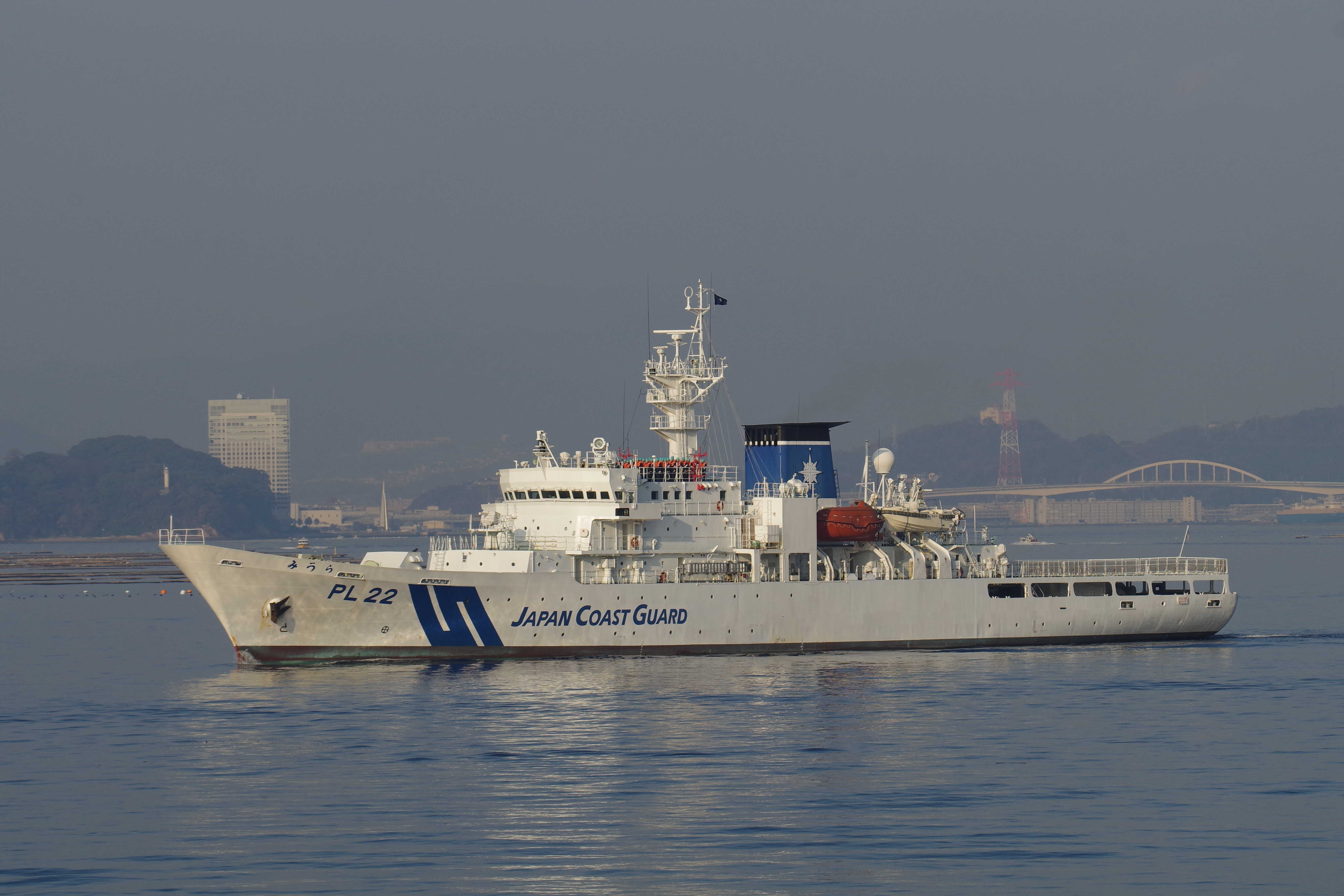 航行する巡視船みうら